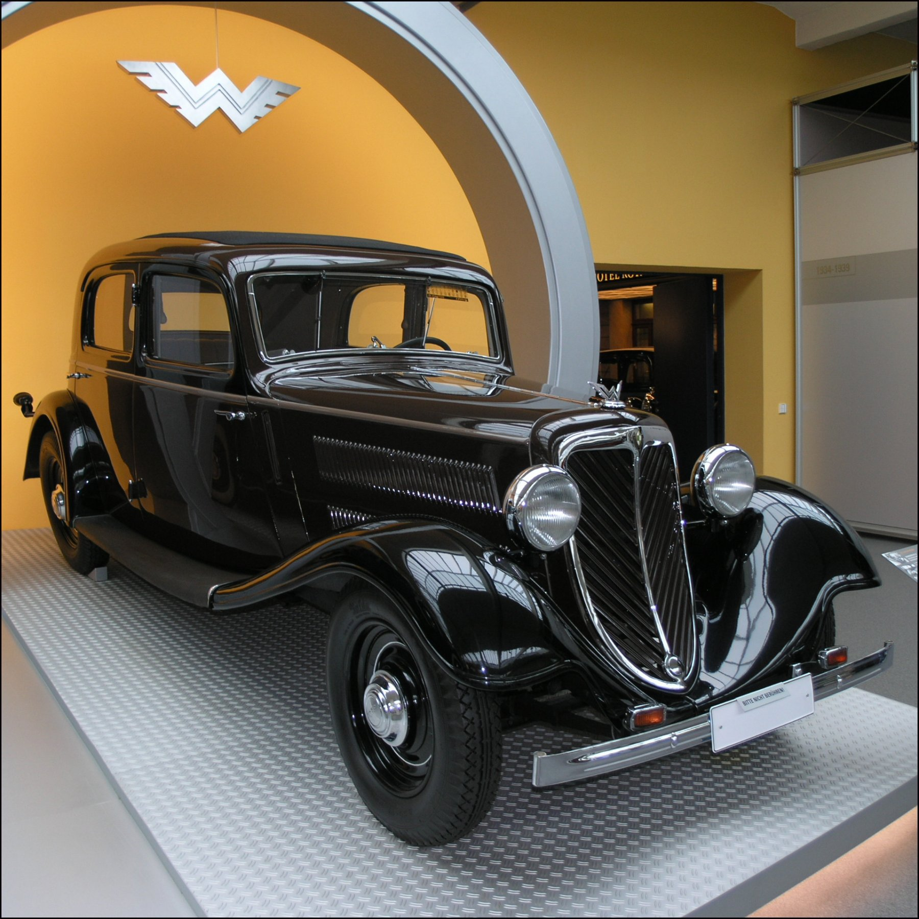 Wanderer W 21 (1933 / 1933-1935 4654 vozů)